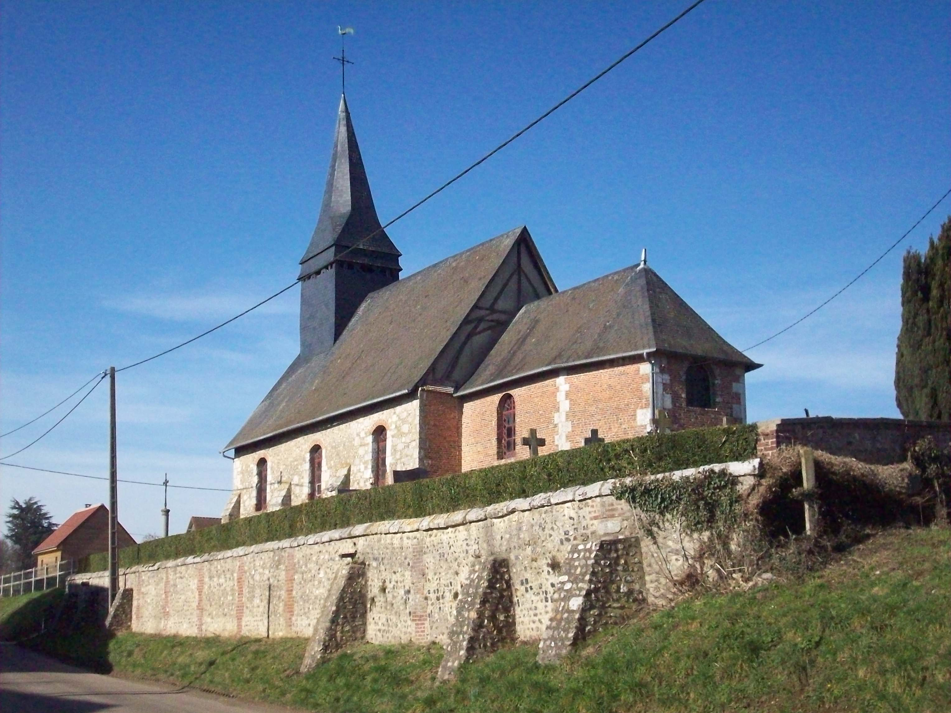 Église Saint-Julien.